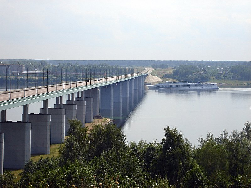 Мост через Волгу в Кинешме